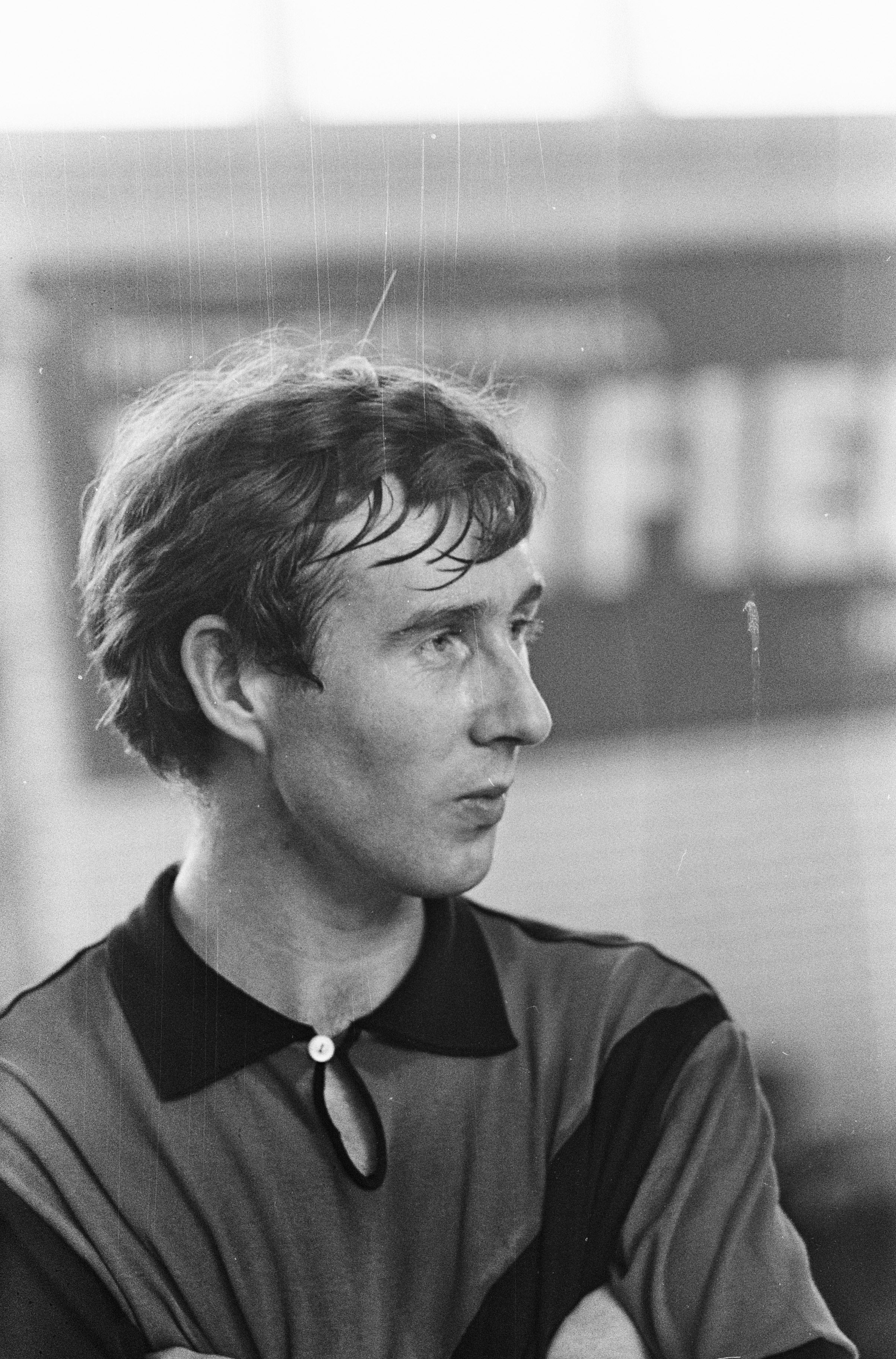 Jacques de Vink